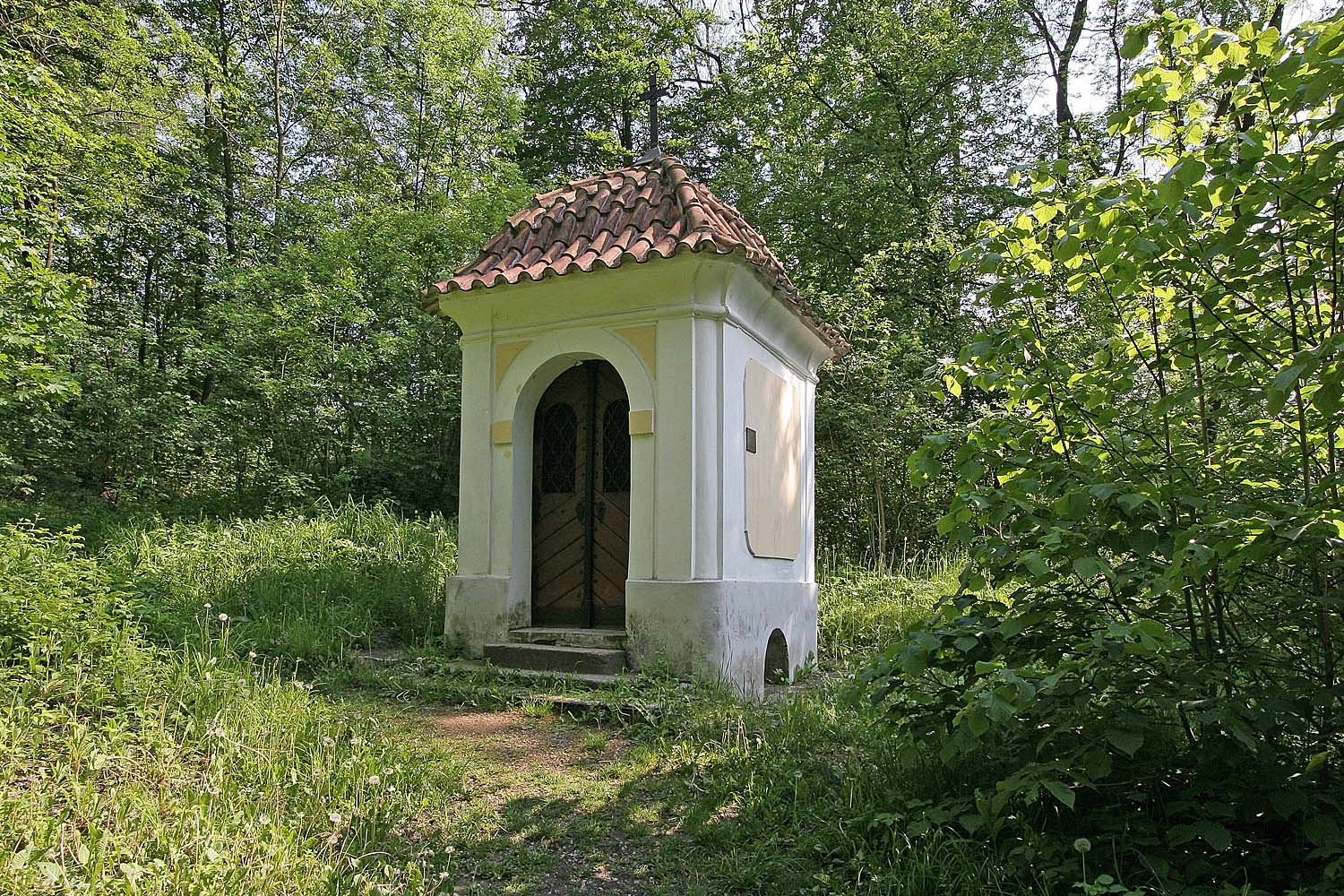 Lázně Bohdaneč - Kuttnerova kaplička v zeleni